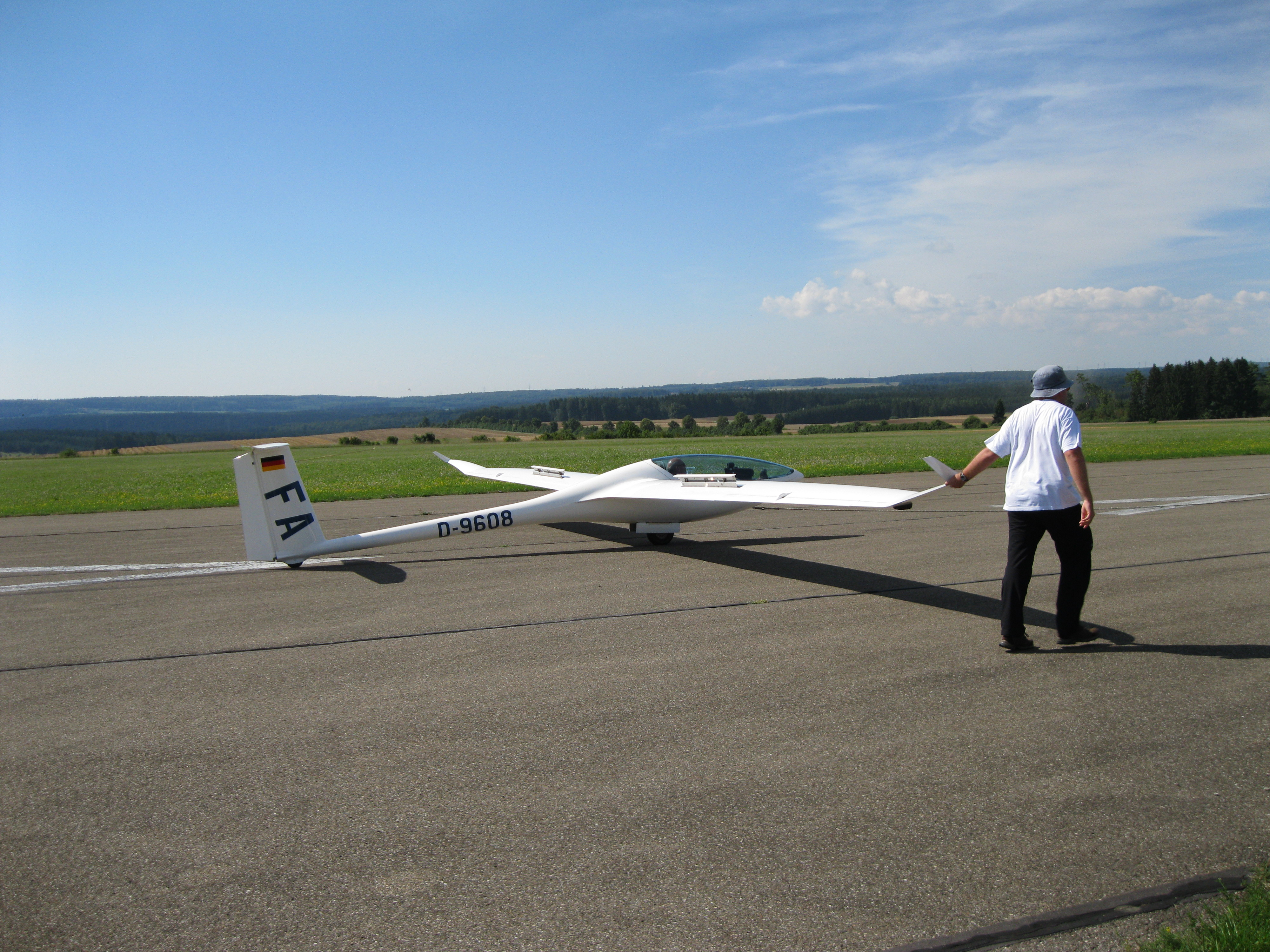 AK-8 beim Start zum F-Schlepp in Aalen-Elchingen